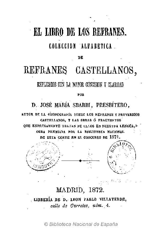 El libro de los refranes : colección alfabética de refranes castellanos, explicados con la mayor concisión y claridad por José María Sbarbi Autor: Sbarbi y Osuna, José María (1834-1910) Fecha: 1872 Datos de edición: Madrid, Librería de León Pablo Villaverde